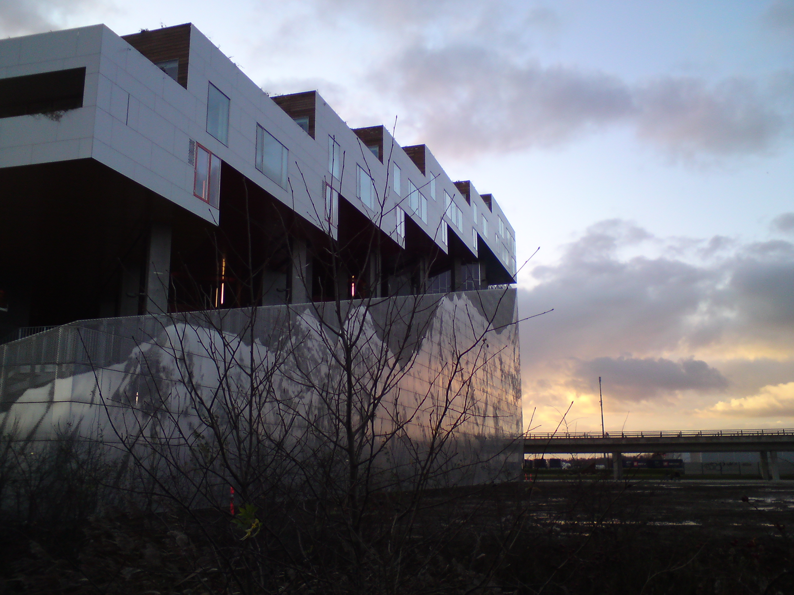 VM Mountain in Ørestad, Copenhagen, Denmark. Architects: Bjarke Ingels Group / Julien de Smedt